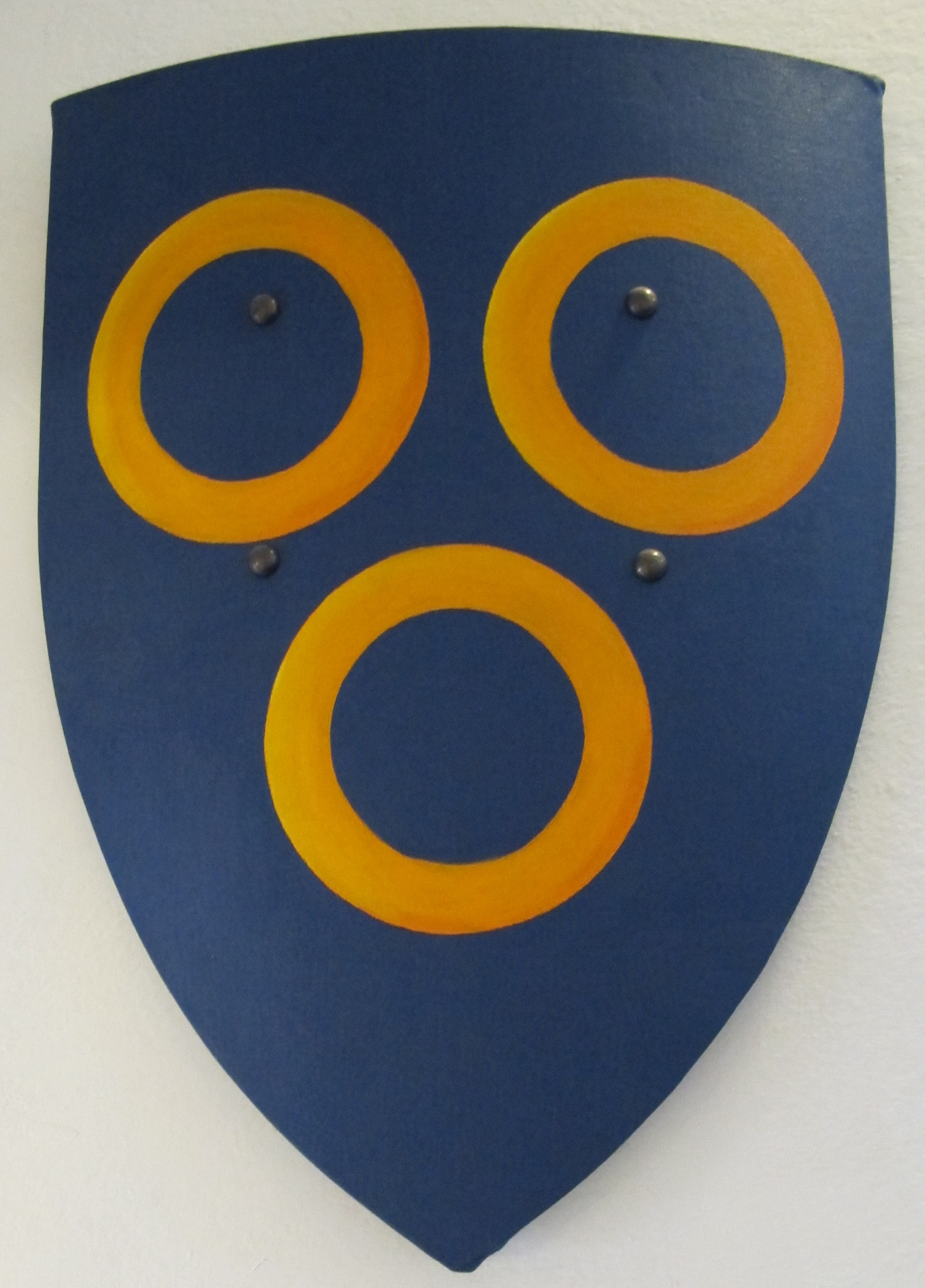 Casa di dante, fi, stemma cerchi